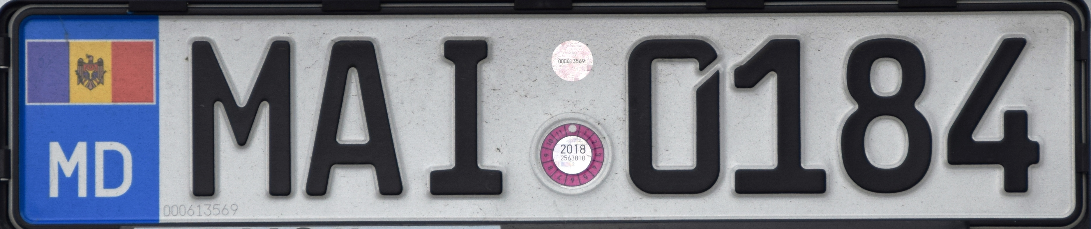 Politie kentekenplaat Moldavië